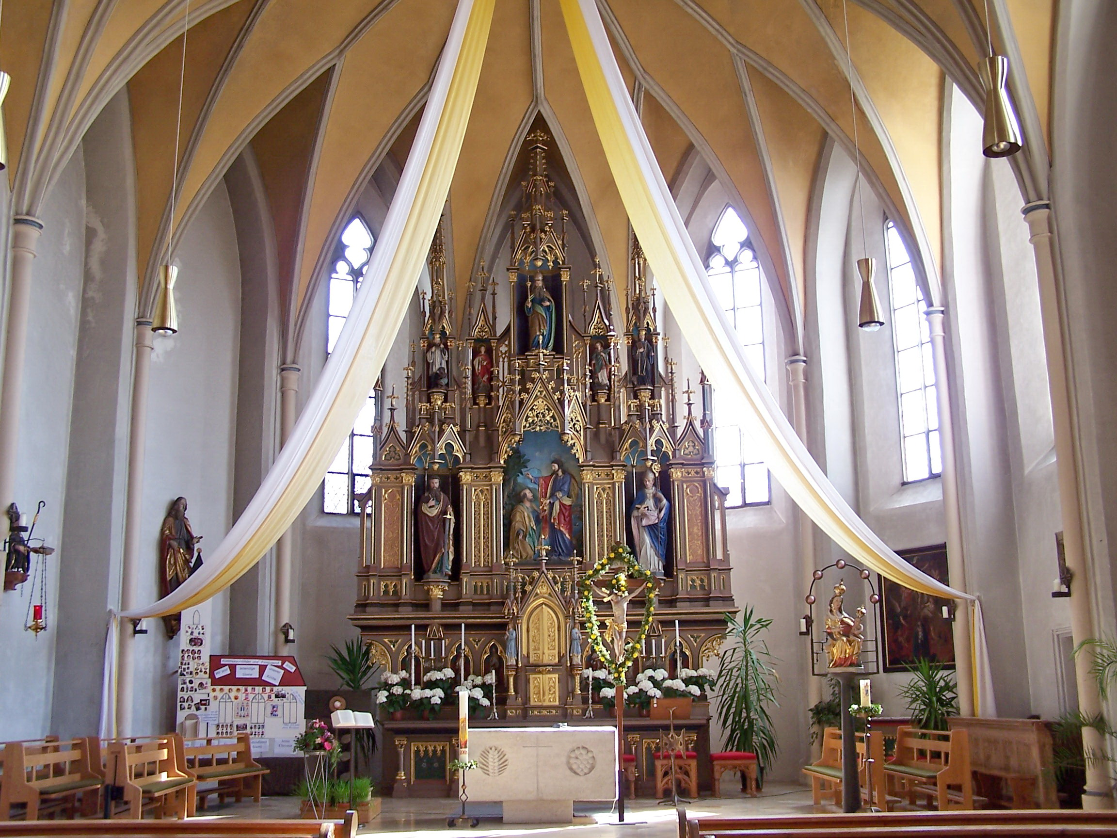 Ergolding, Lindenstraße 94. Katholische Kirche St. Peter und Paul. Saalkirche, spätgotische Anlage, zweiten Hälfte 15. Jahrhundert, Südseite mit Turm älter, Gliederung durch Streben und umlaufenden Dachfries, südseitig Chorflankenturm mit Geschossgliederung, Achteckaufsatz und Spitzhelm. Innenraum mit netzförmig figuriertem Rippengewölbe. Neugotische Einrichtung.